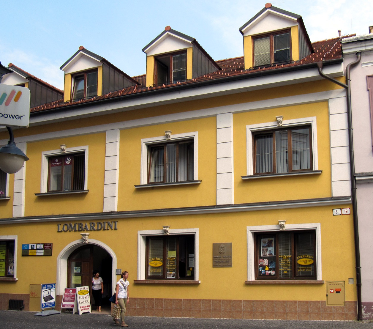 Zilina, Horny val 19, dom Alexandra Lombardiniho